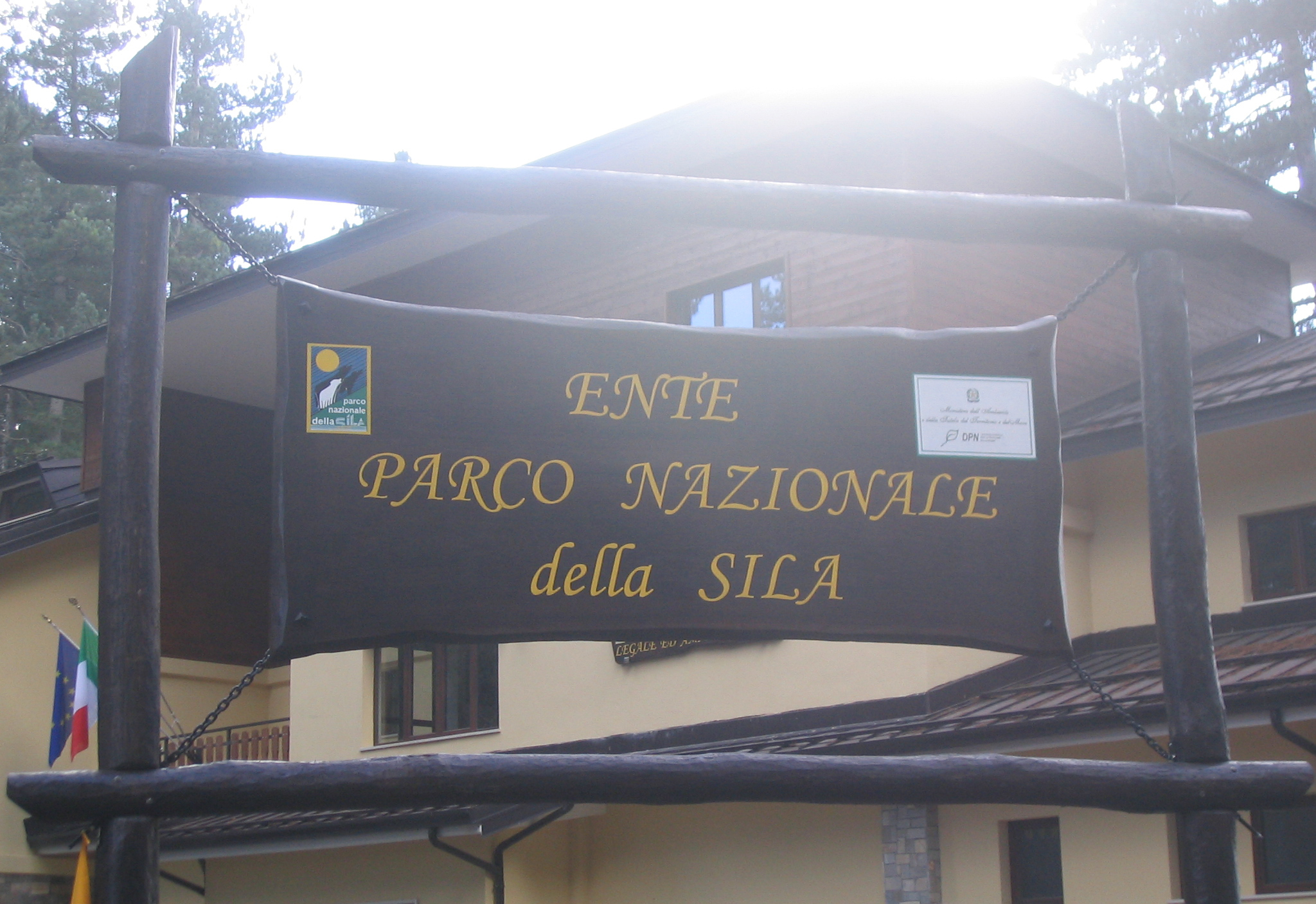 San Giovanni in Fiore. La sede del Parco Nazionale della Sila a Lorica.